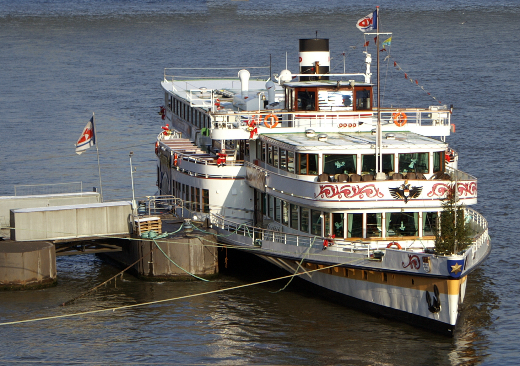 Der Raddampfer Goethe bei schönem Wetter am Anleger in Köln.